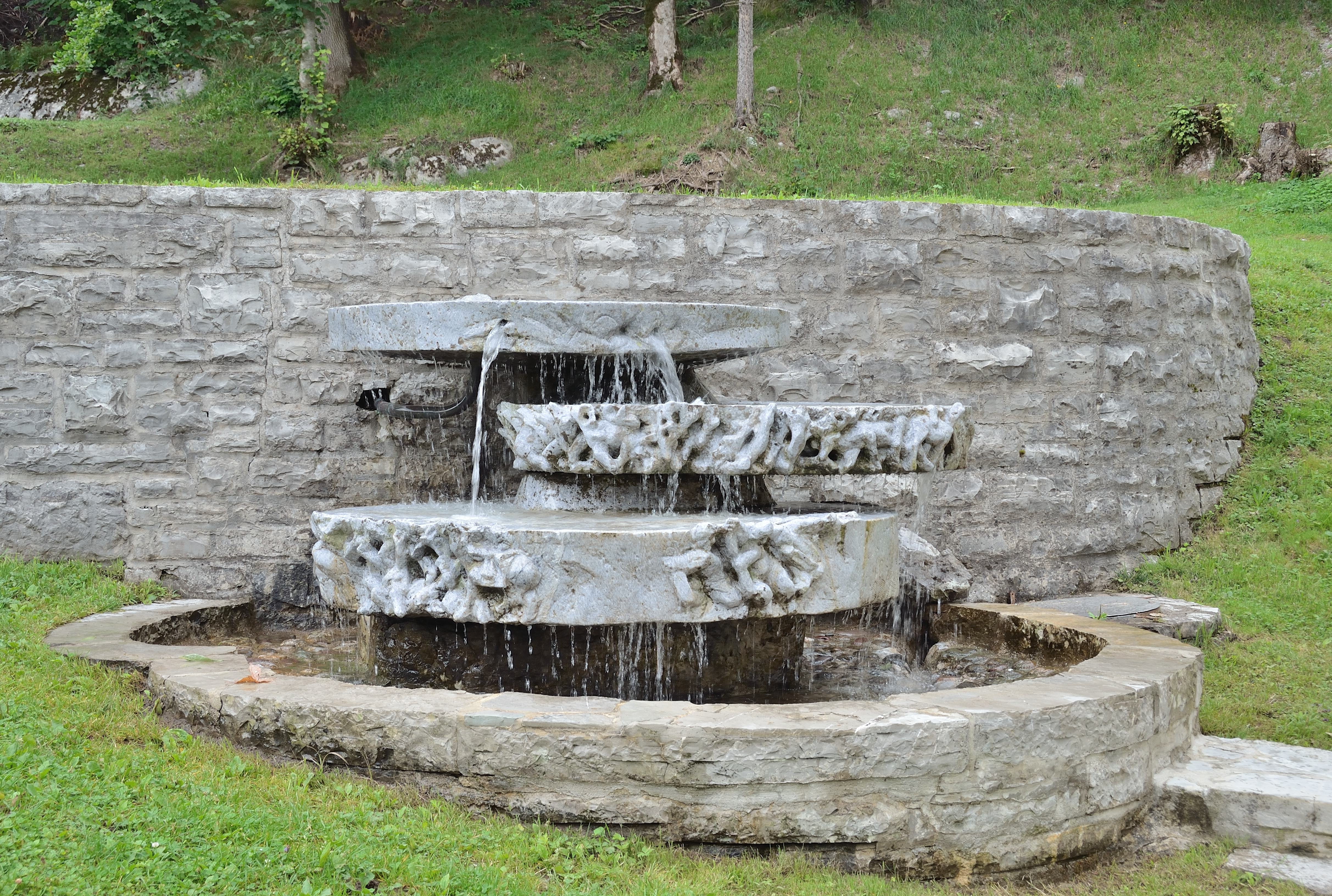 Das Brunnecker Bründl neben der kath. Filialkirche Maria Bruneck am Pass Lueg wurde 1972 von Josef Zenzmaier gestaltet.